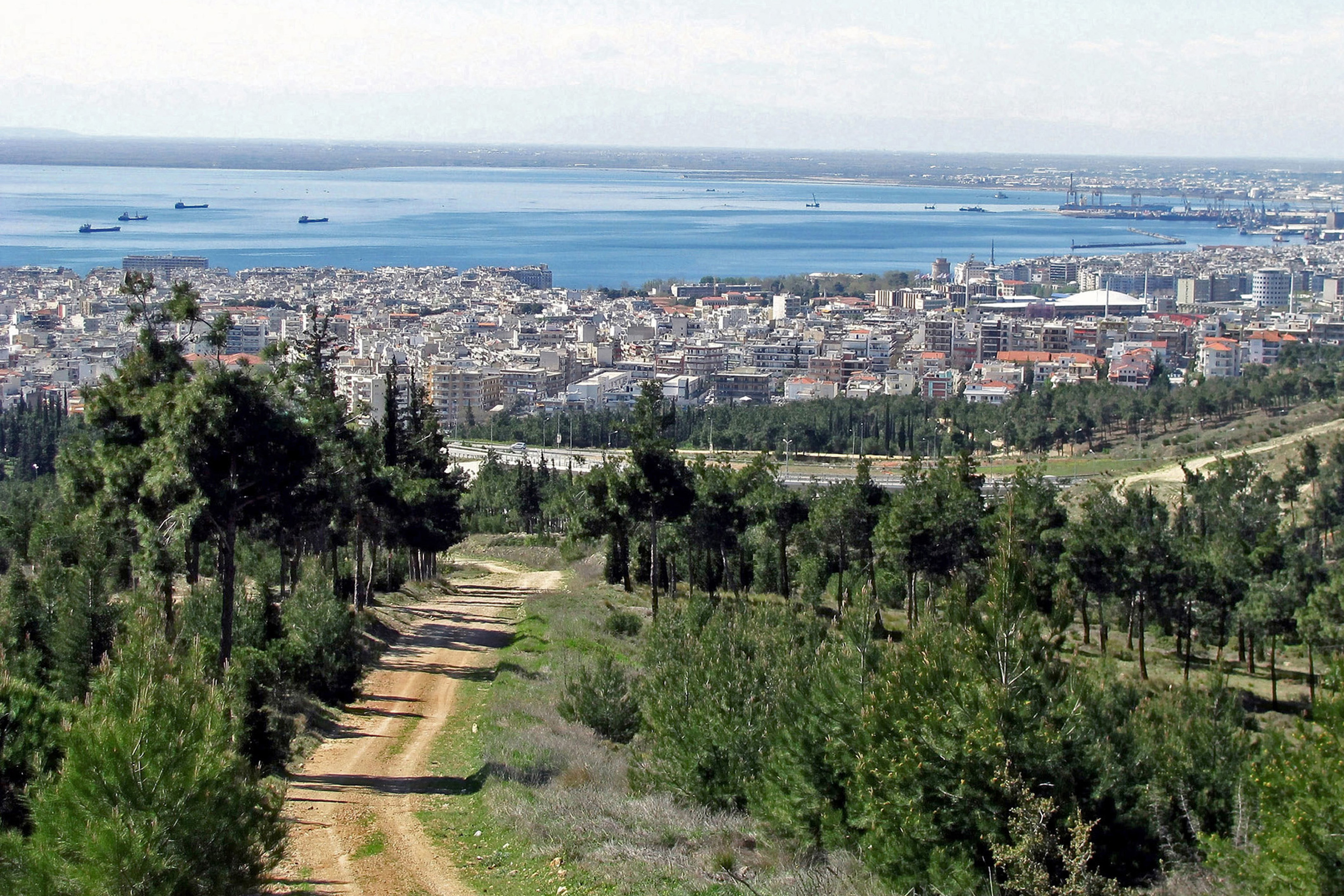 Η Θεσσαλονίκη από το Δάσος